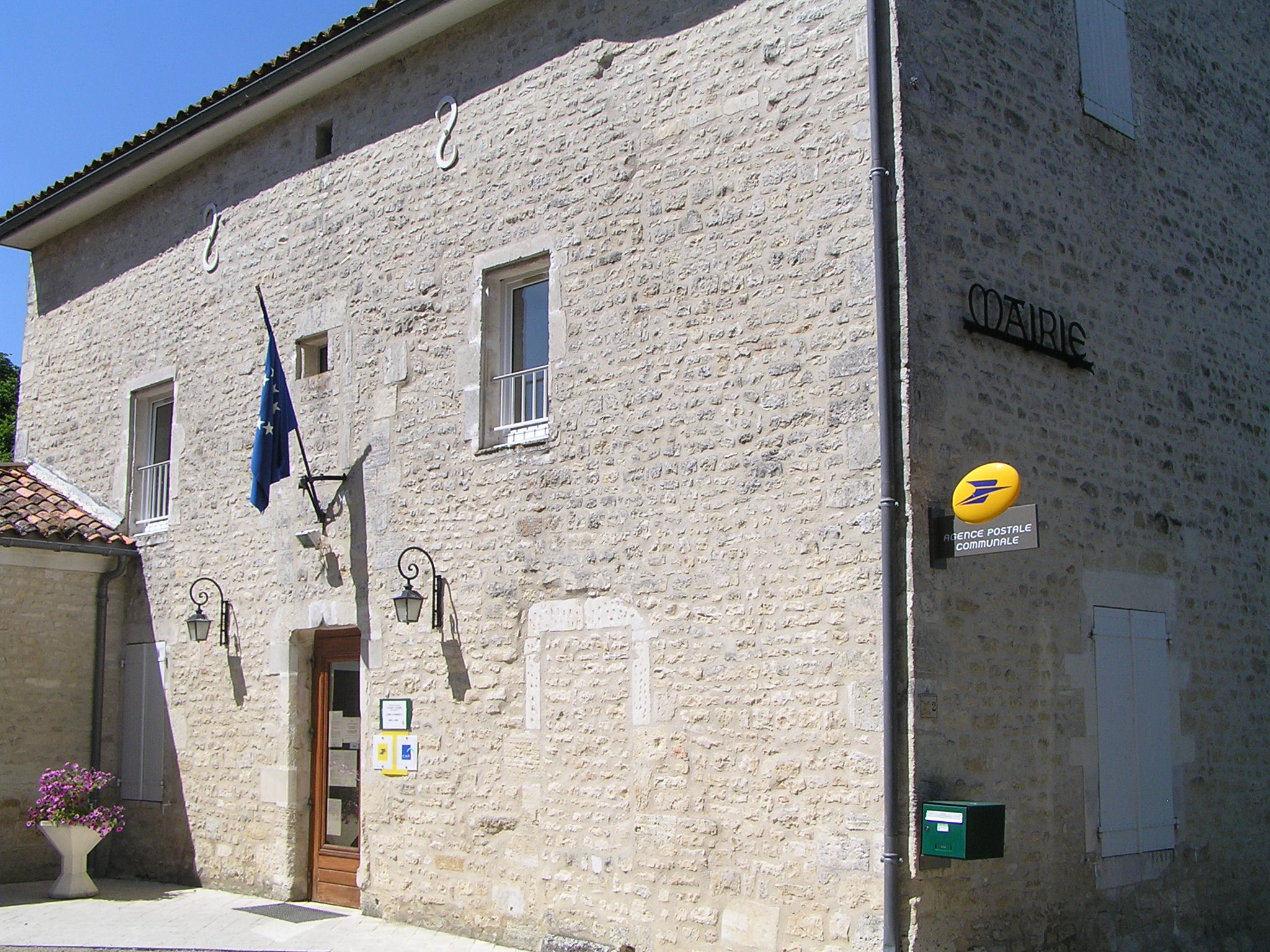 mairie de Mareuil